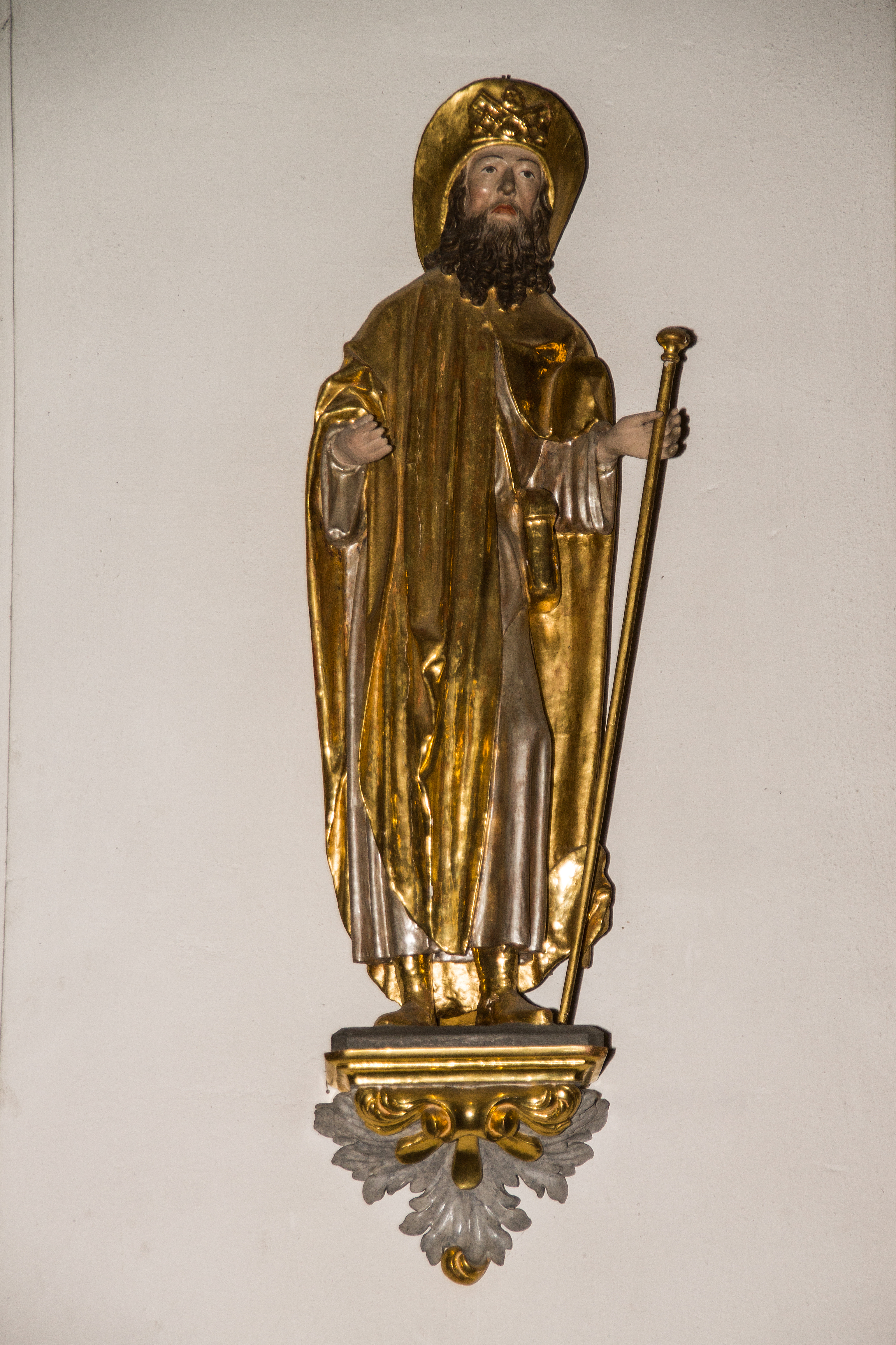 St. Jakobus der Ältere in der St. Jakobus Kirche Lauda